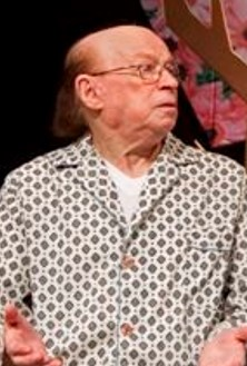 יעקב בודו